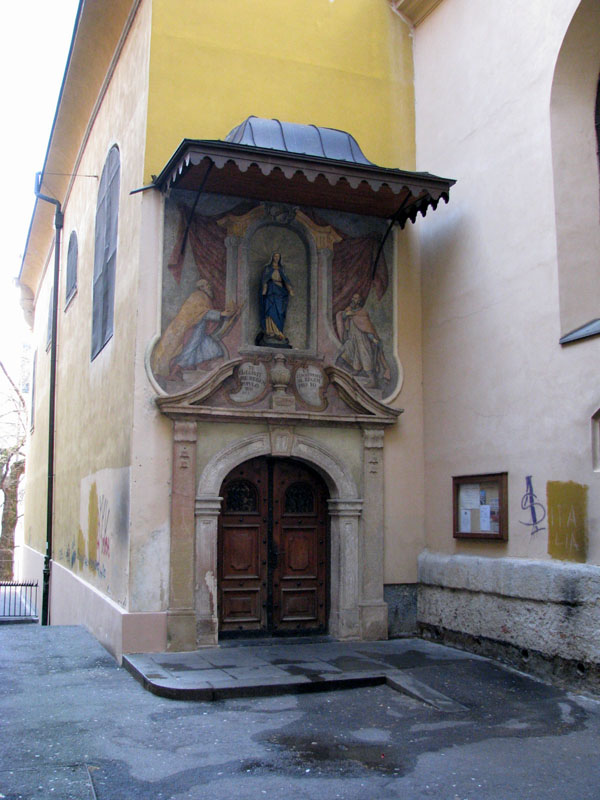 Crkva sv. Marije na Dolcu, Zagreb